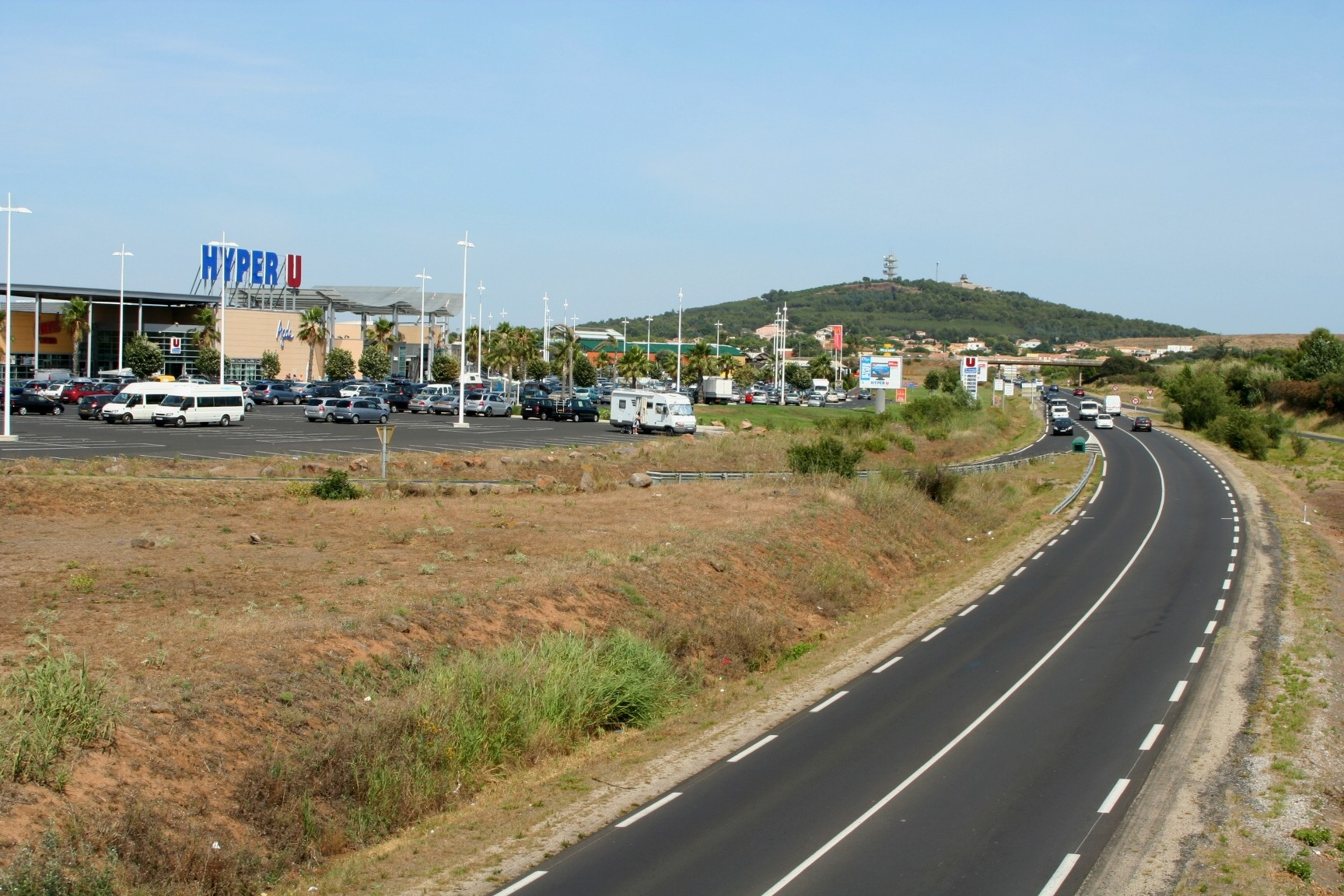 Hypermarché Hyper U à Agde (Hérault , France) devant la rocade sud (RD 612), au fond le mont Saint-Loup